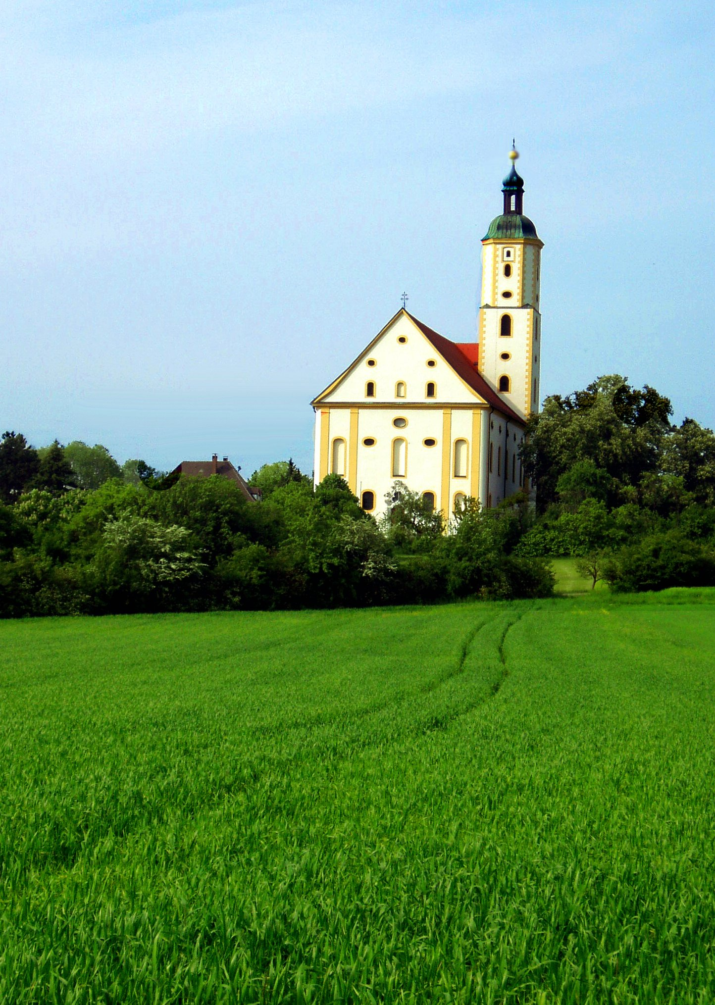 Wemdinger Wallfahrtskirche own photography 20.05.05